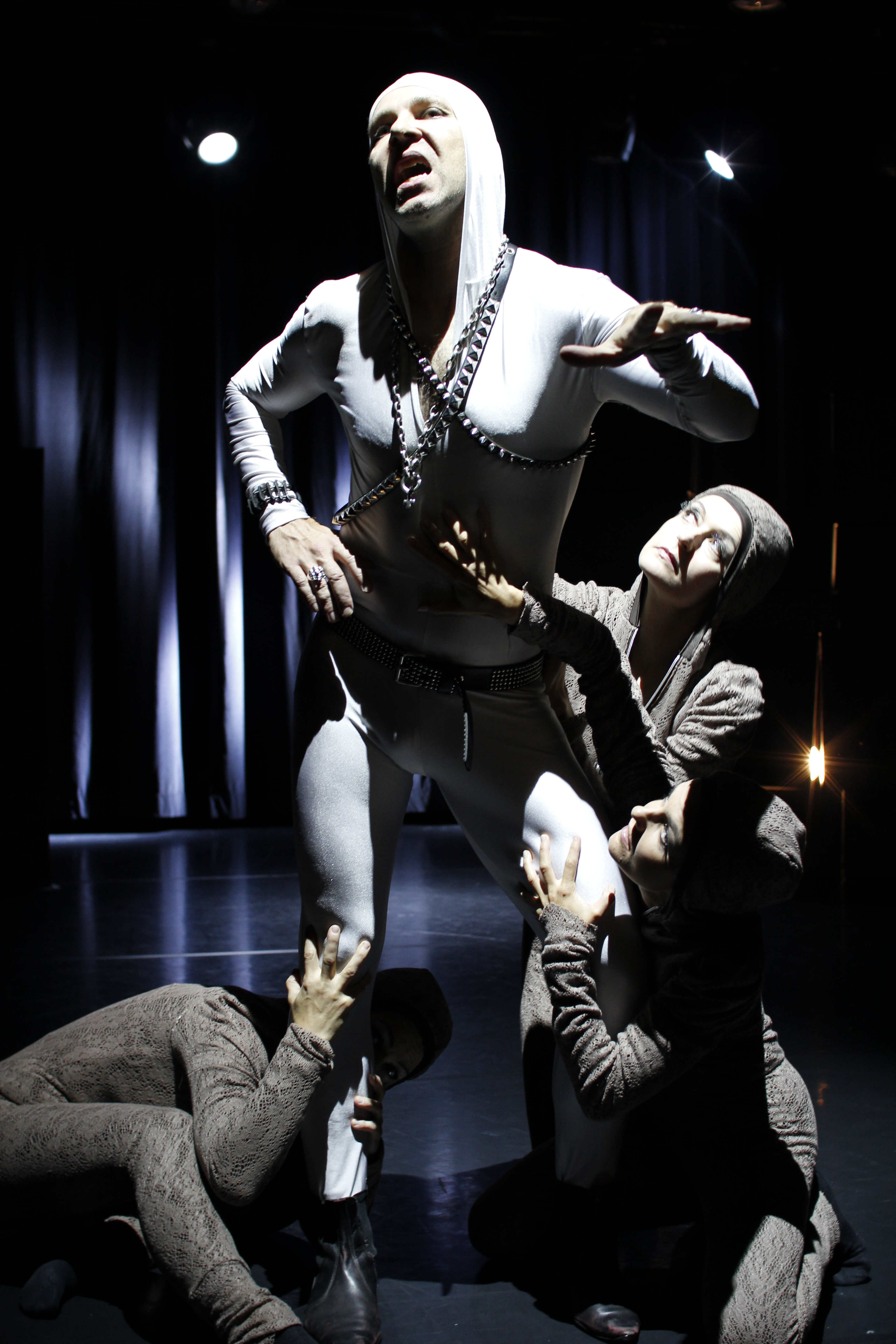 Kuolio Kuolio-musikaalissa.